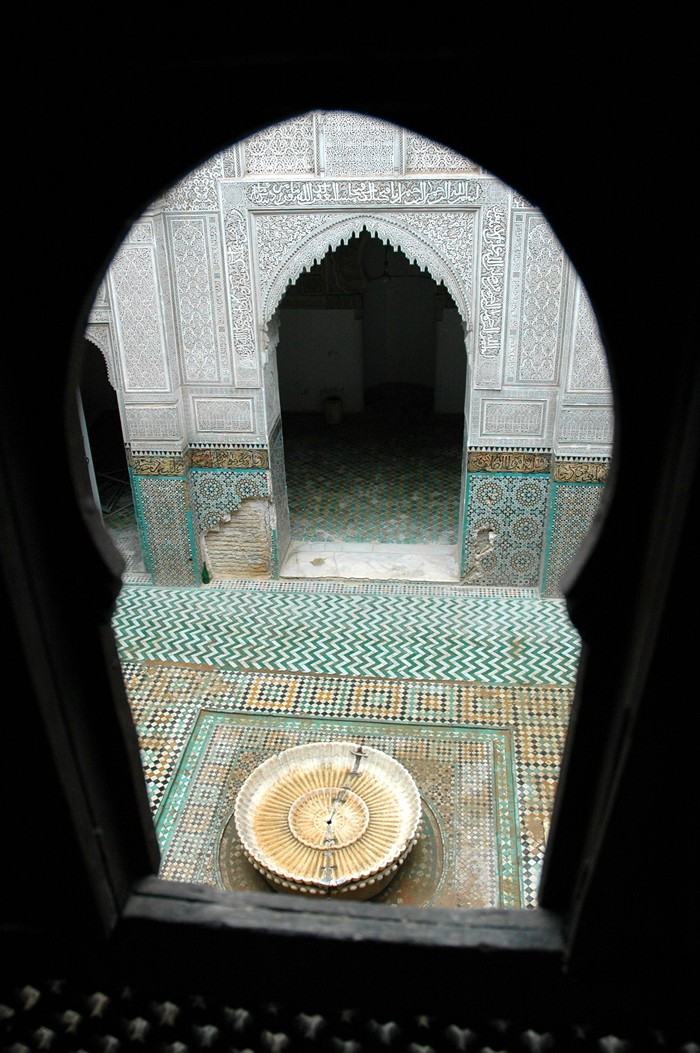 Meknes - Madrassa Bou Inania - Font des de cel·la